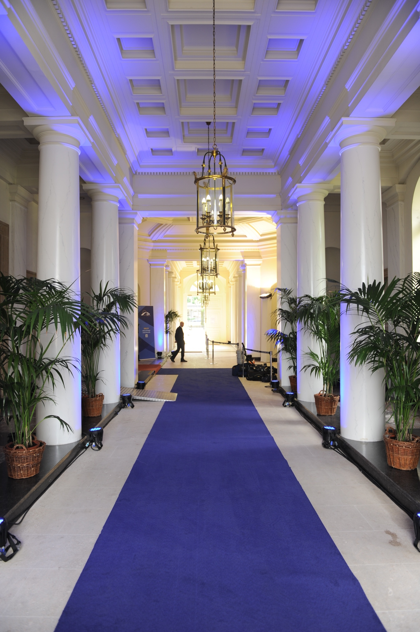 EPP Summit, 28 June 2012